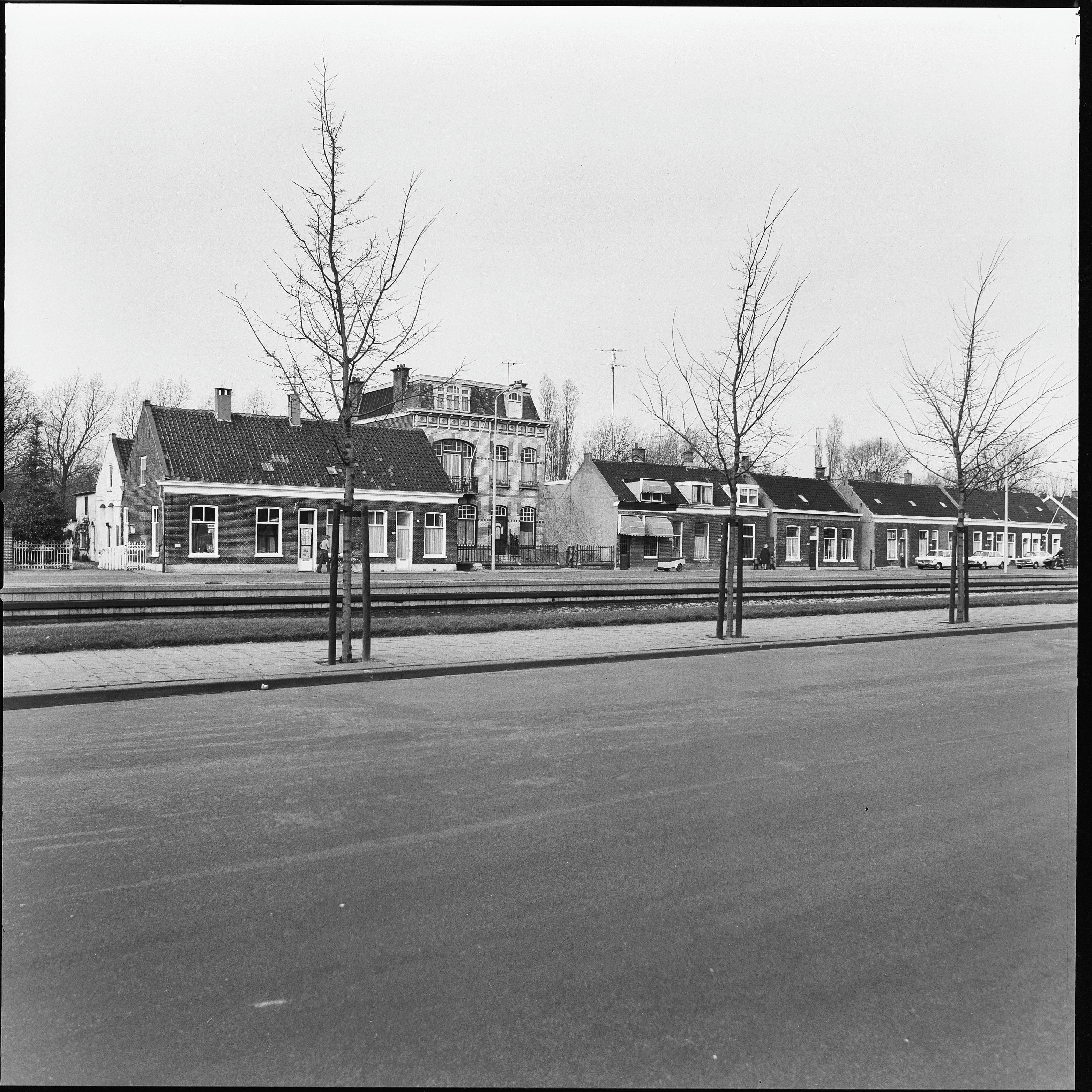 overzicht